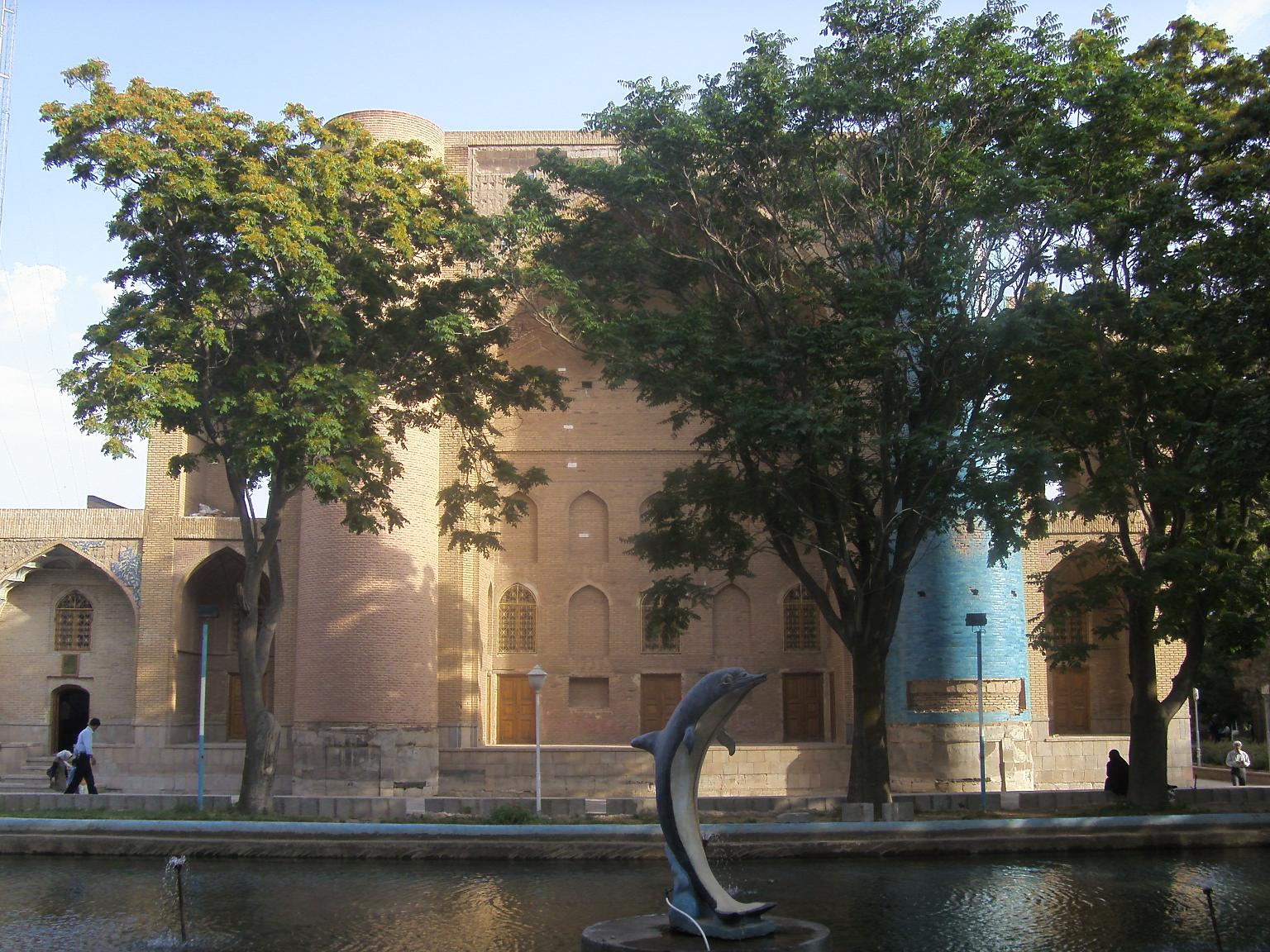 Sheikh-shahab tomb, Ahar, Iran